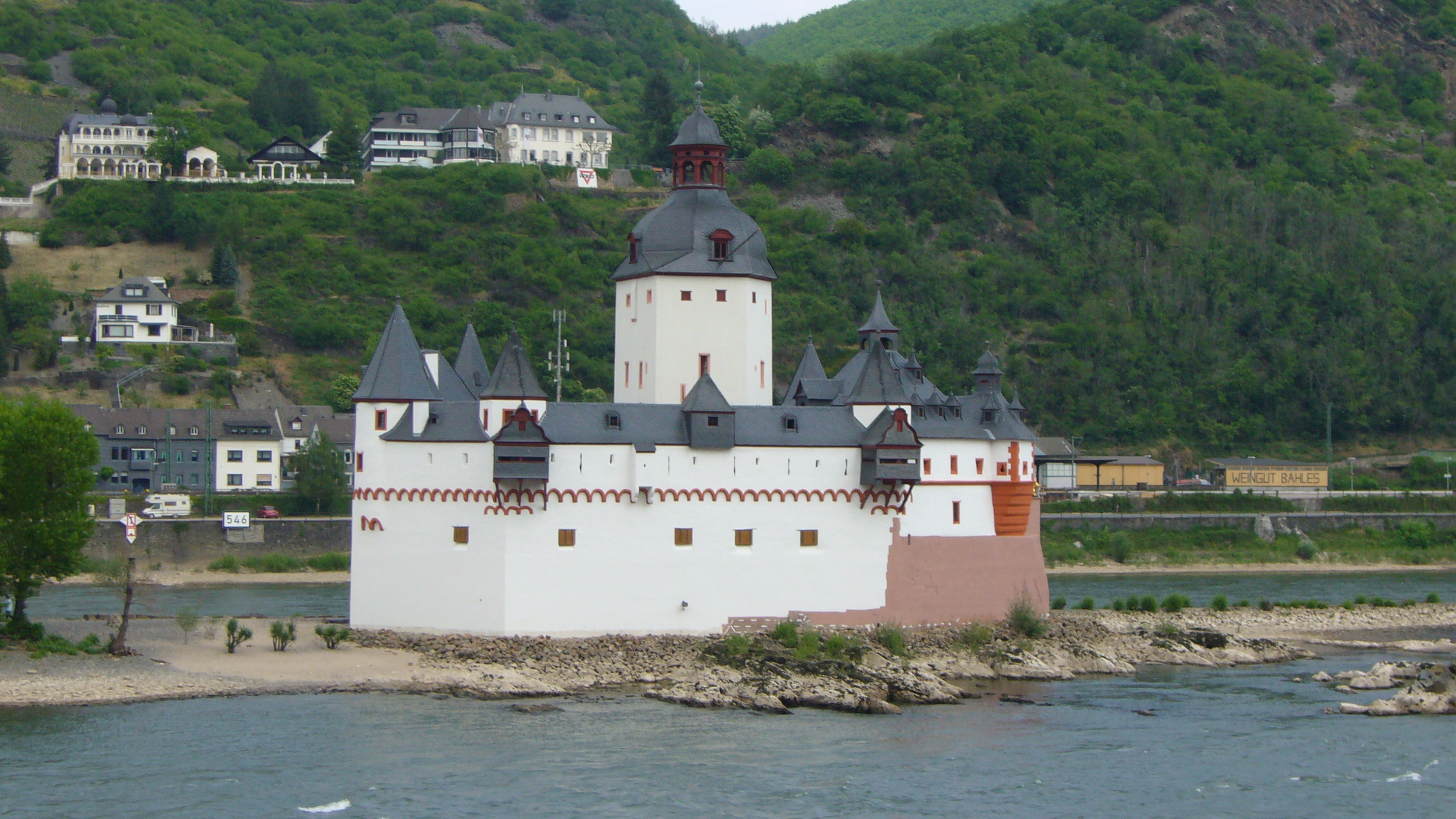 Burg Pfalzgrafenstein, im Hintergrund die Elsenburg des CVJM am Volkenbachtal über der Stadt Kaub.